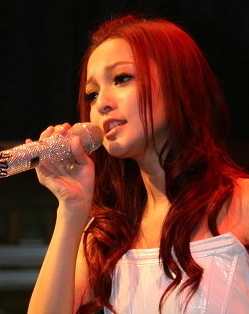 張韶涵第五季專輯簽唱會＠河岸留言Bân-lâm-gú: Tiunn Siâu-hâm tē-gōo-kuì tsuan-tsi̍p tshiam-tshiùnn-huē @ Hô-huānn Liû-giân.